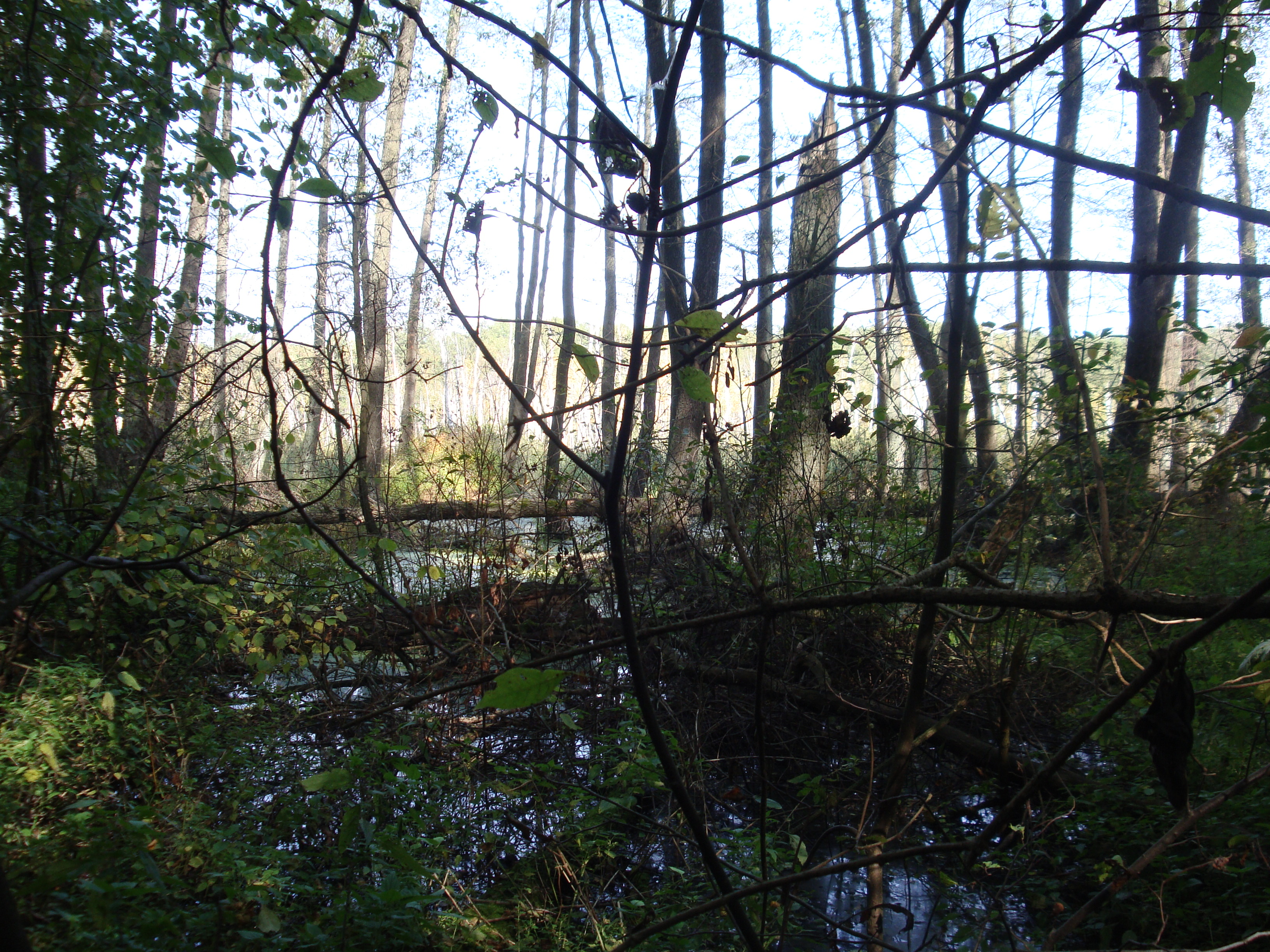 Романівське болото, Святошинський район